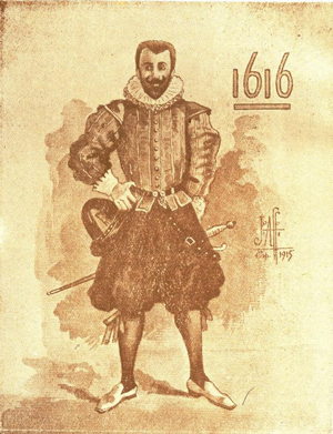 Capitão Francisco Caldeira Castelo Branco. Aquarela de João Affonso do Nascimento, 1915.